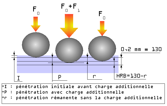 Wikipedia francesa